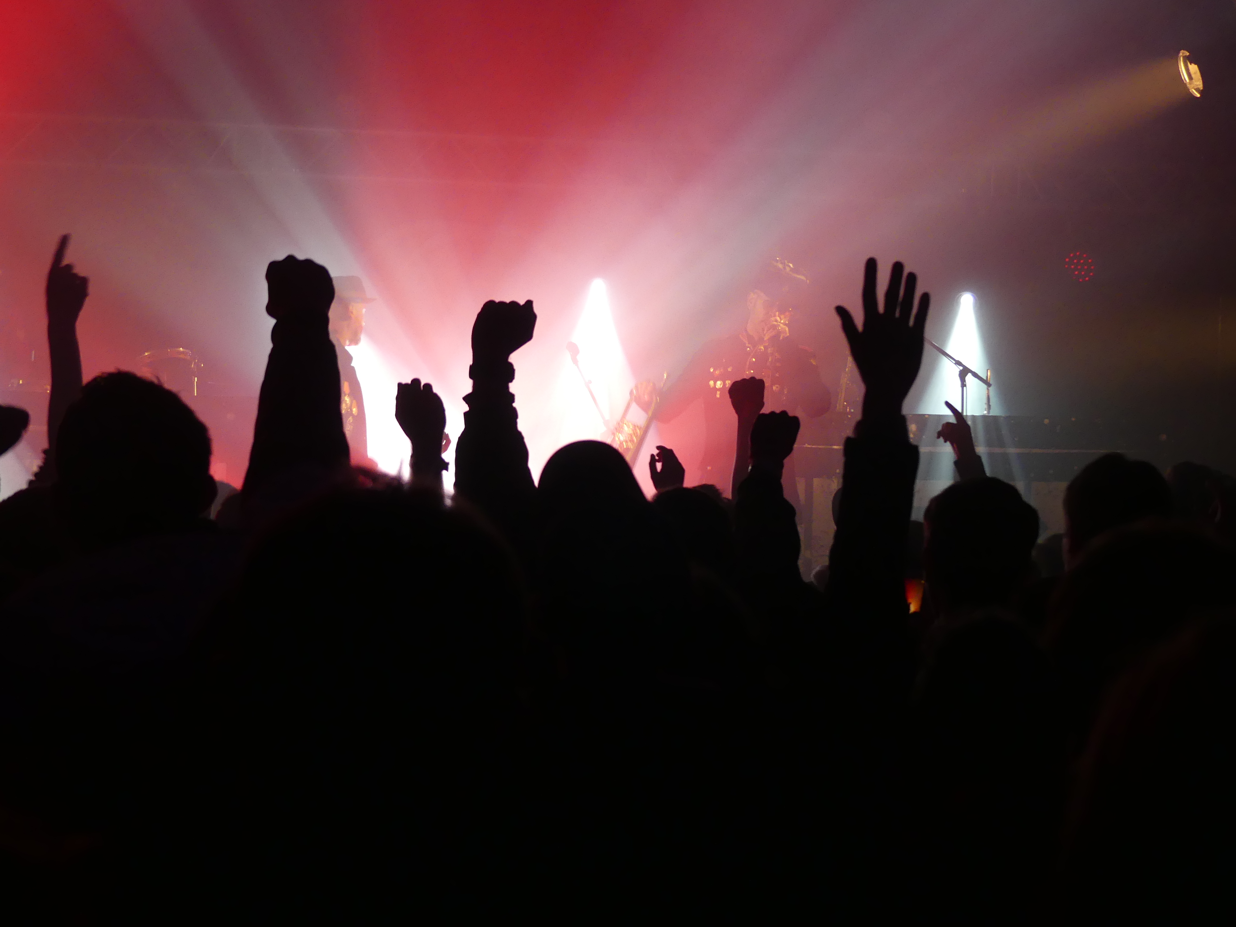 Veyracos 2018